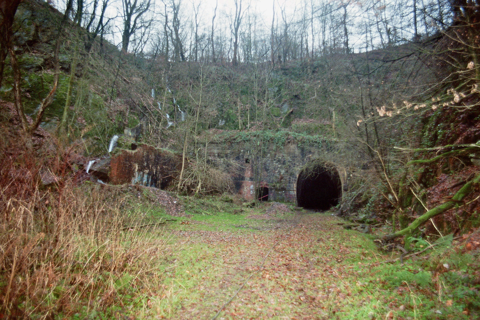 Scheetunnel an der Bahnstrecke Wuppertal-Wichlinghausen–Hattingen, Nordportal im Stadtgebiet von Sprockhövel: links der zugemauerte Zugang zur Oströhre (ehemalige U-Verlagerung „Kauz“)